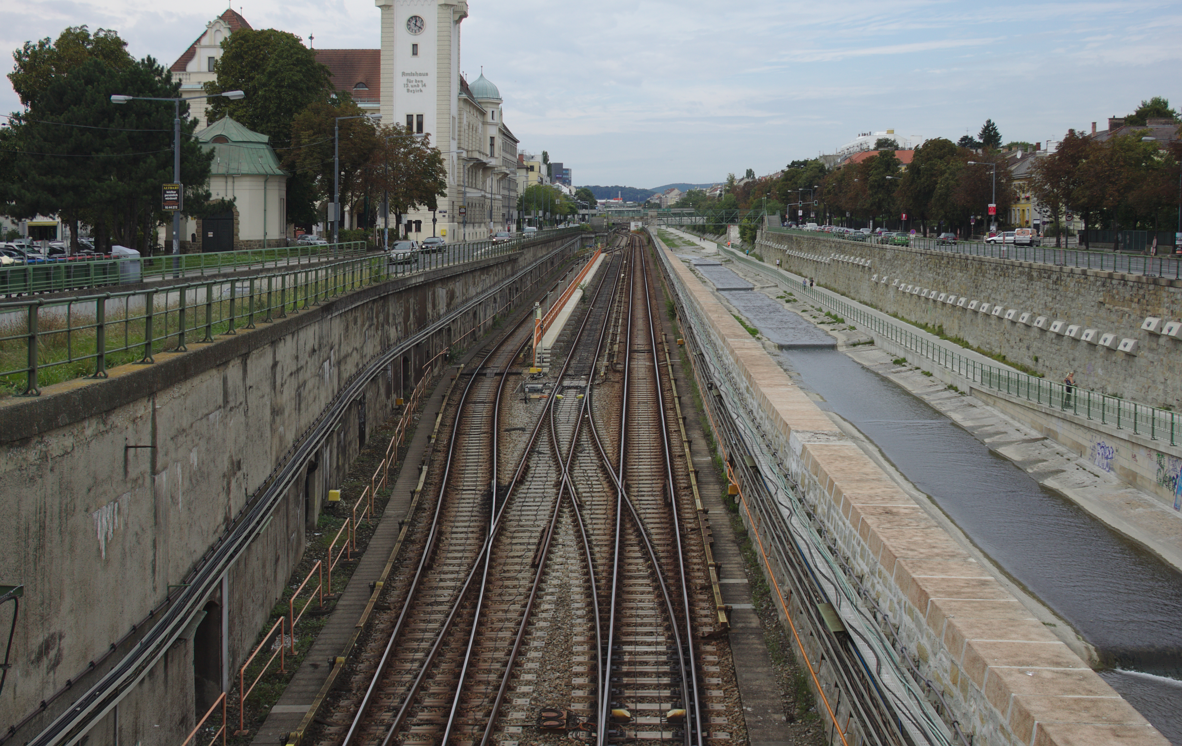 ehem. Stadtbahn - Teilbereich der heutigen U4